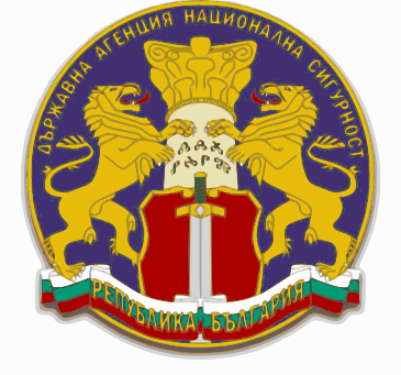 Лого на ДАНС. Изображението е преработено от оригинала